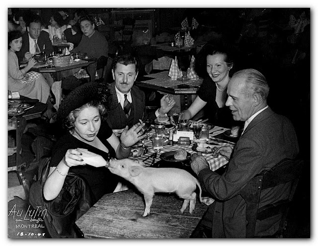 "Au lutin qui bouffe", les clients pouvaient fraterniser avec la mascotte.